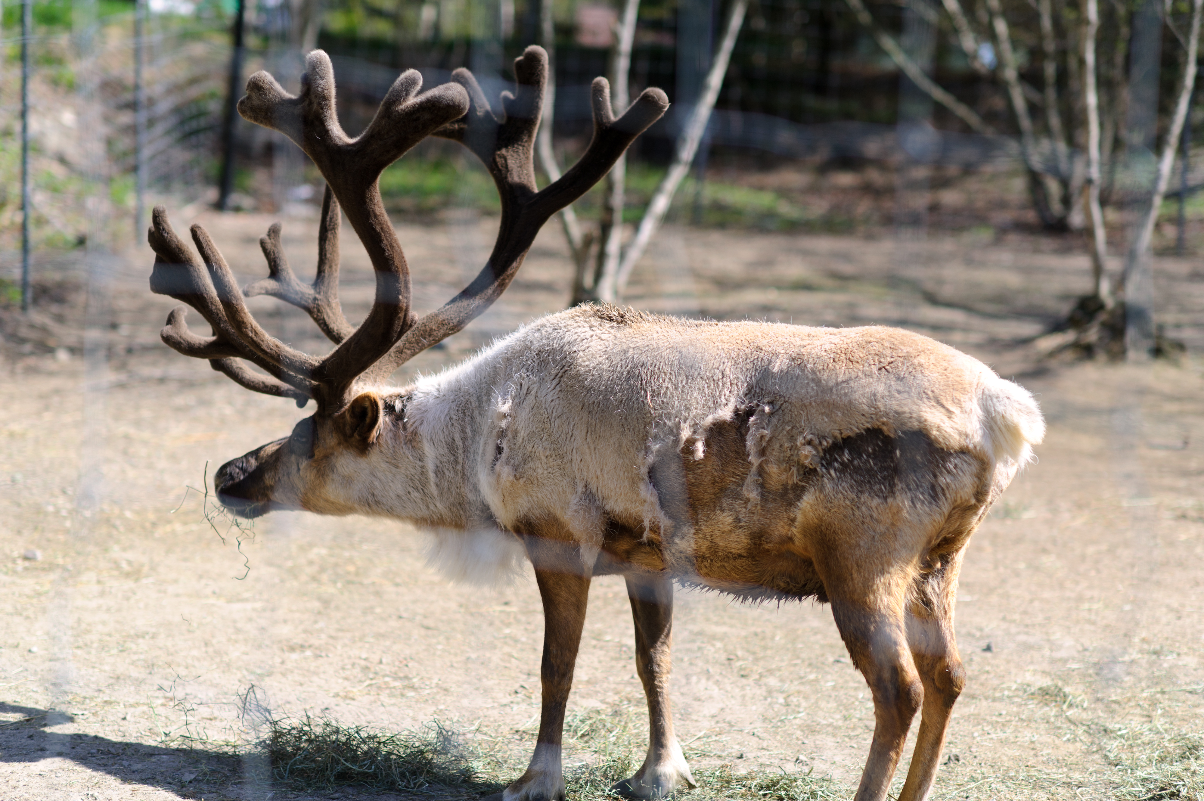 Reindeer with Velvety Antlers